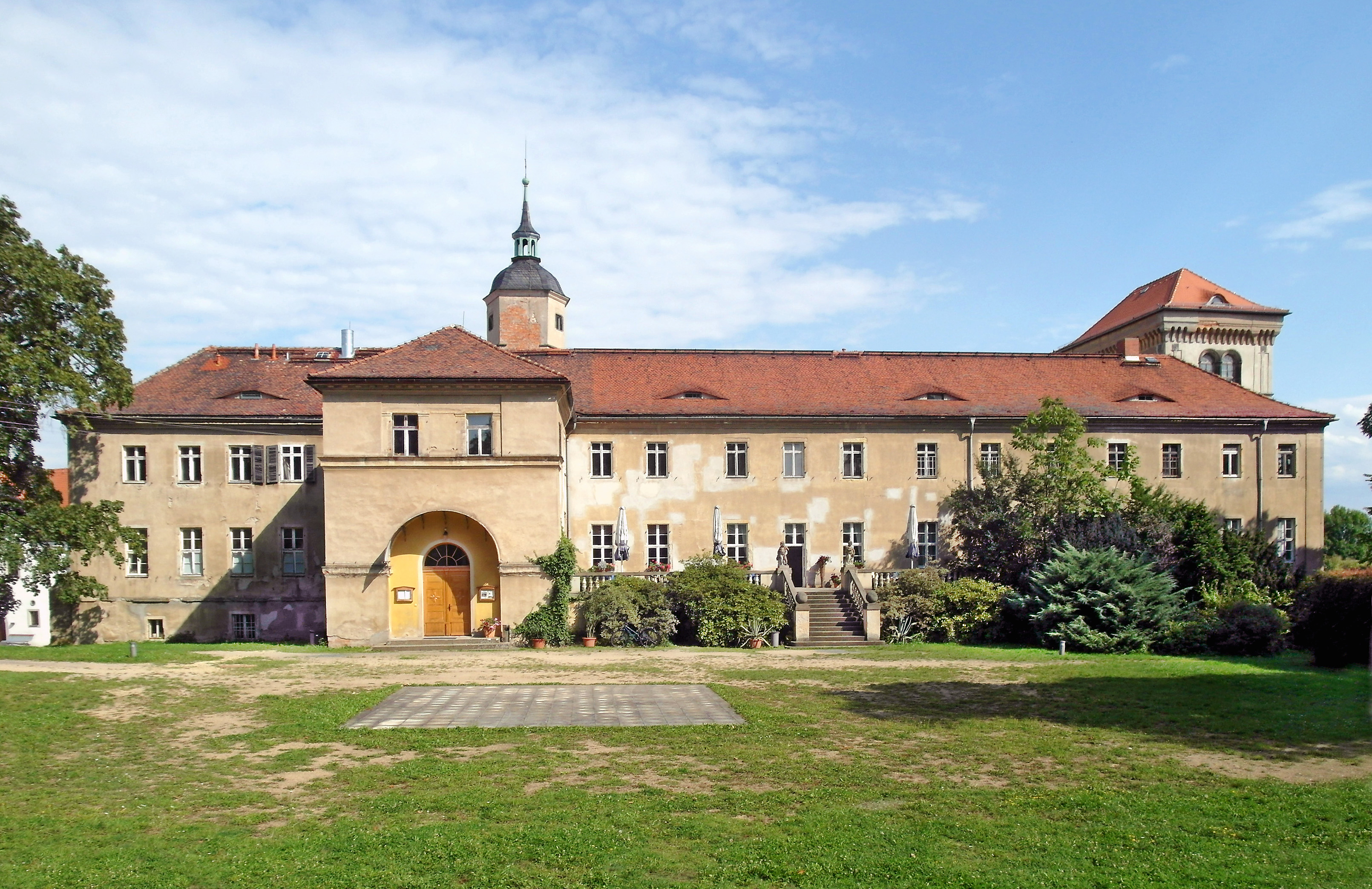 21.08.2014 01809 Gamig (Dohna): Gut Gamig (GMP: 50.961542,13.841720). Aus einem um 1445 genannten Vorwerk entstand Anfang des 16. Jahrhunderts ein Rittergut. Dem 1575 erbauten Schloß wurden 1834 der auch als Semperturm bezeichnete Wohn- und Bibliotheksturm (von Woldemar Hermann, hier rechts hinten) hinzugefügt. Um 1840 entstand das Eingangsbauwerk auf der Parkseite mit der zweiläufigen Treppe zum Hauptgeschoß (ebenfalls von Woldemar Hermann). Sicht von Westen. [SAM5552.JPG]20140821010DR.JPG(c)Blobelt